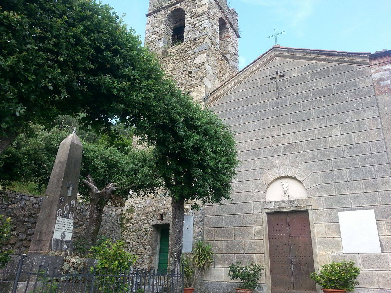 chiesa torcigli